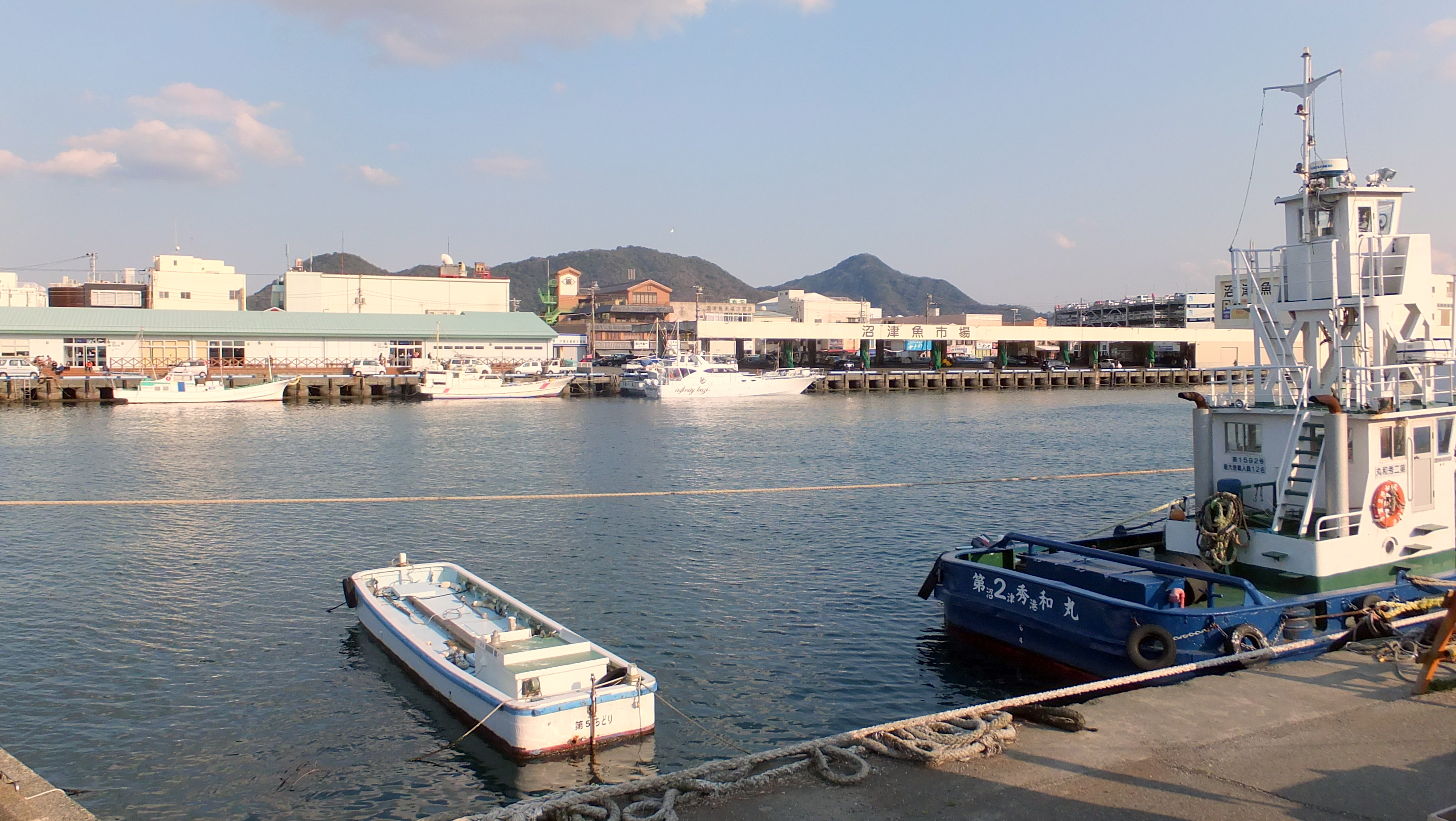 港の市場